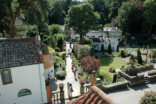 Autore: indigogoat Descrizione: la Piazza del villaggio di Portmeirion, dove fu girata la serie Il prigioniero Origine: Flickr URL